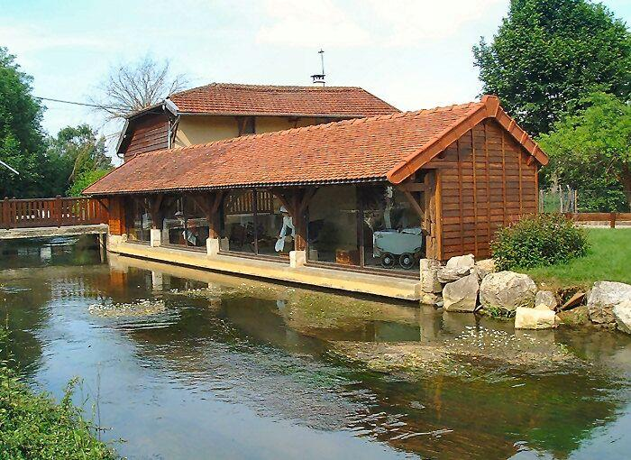 Ce lavoir à été mise au service de l'armée et s'inscrit donc dans l'histoire de France. En effet, durant la Première Guerre mondiale, le début des combats dans la commune ont eu lieu le 18 septembre 1914, les tranchées étaient tenues par le 106e régiment d'infanterie.